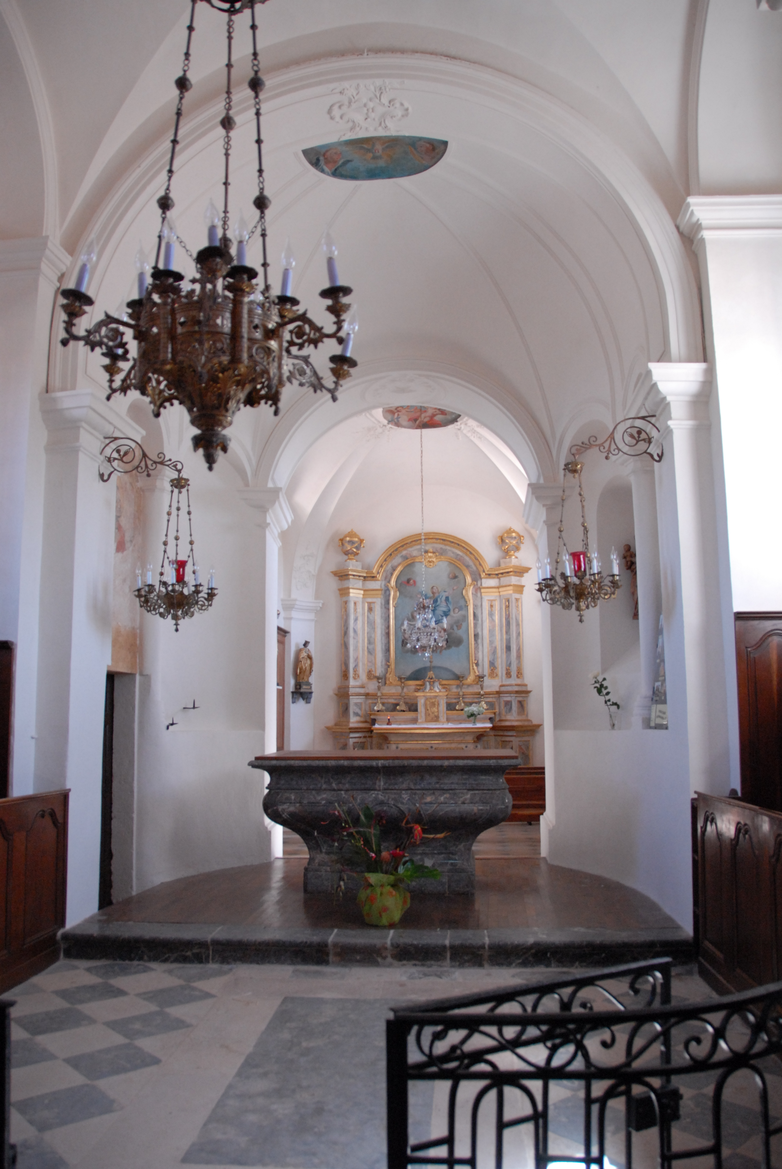 Sts-Pierre-et-Paul de Montceaux-l'Étoile, Aus Vorjoch zum Chor